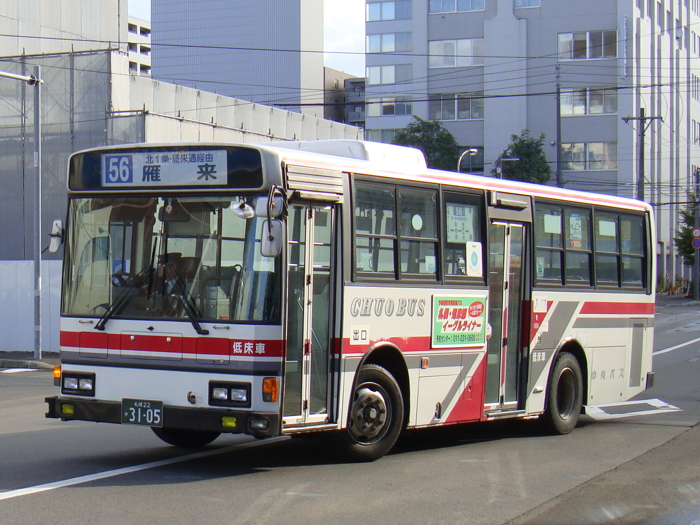 Sapporo city line